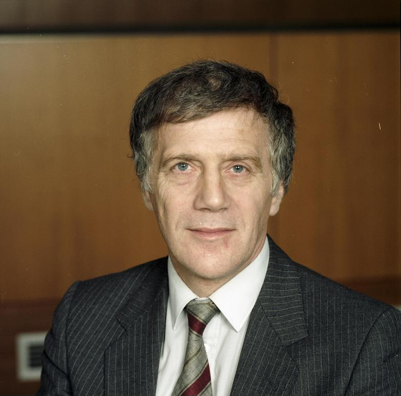 18.12.1989 Dr. Jürgen Kühling, Richter am Bundesverfassungsgericht I. Senat